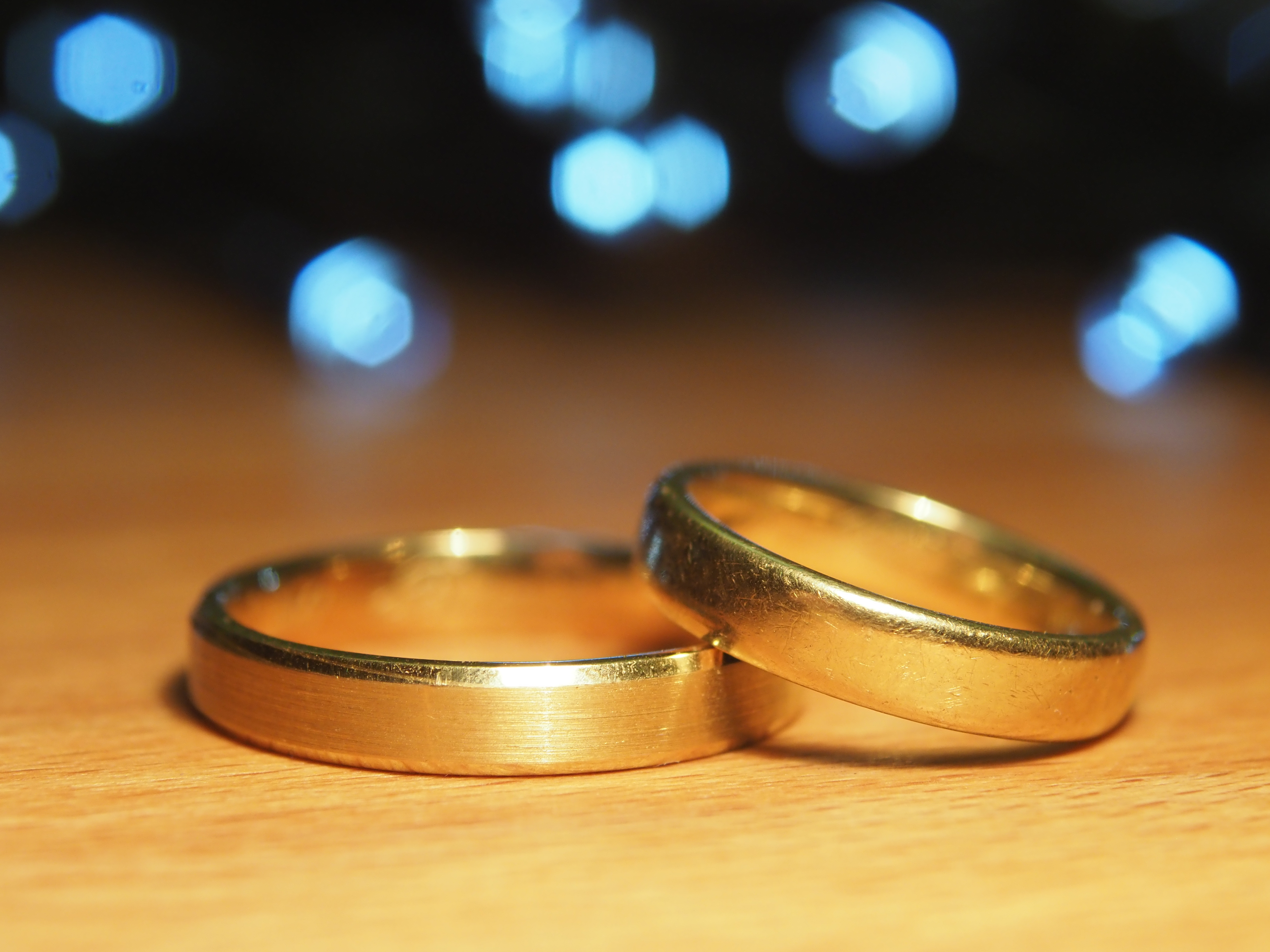 Goldene Eheringe nach 25 Jahren Ehe. Der linke Ring ist kaum getragen, dagegen ist der rechte Ring schon sehr abgenutzt. Links der größere Ring für den Mann und rechts ein kleinerer Ring für die Frau. This photo has been taken in the country: Germany